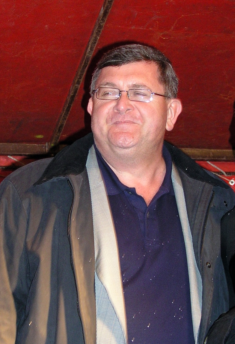 Riječki gradonačelnik Vojko Obersnel na Viškovu nakon spaljivanja pusta, Hrvatska